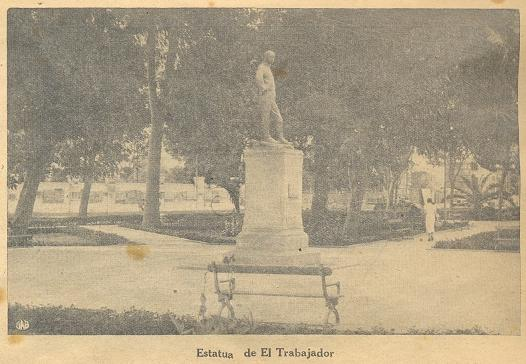 Escultura El Estibador, regalo de la colonia belga al Perú por el Centenario de la Independencia